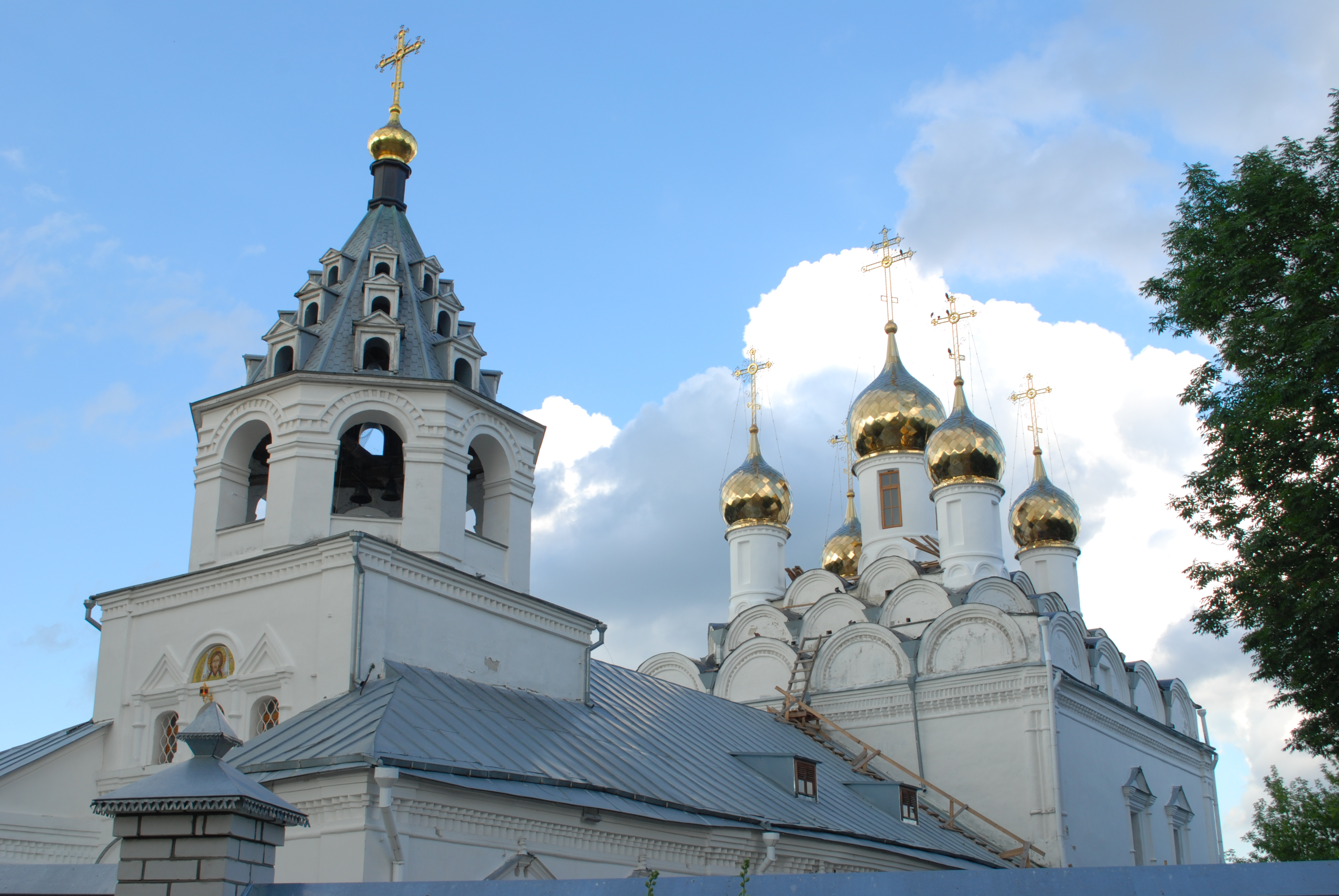 Введенская церковь (Брянская область, Брянск, кулькова улица)